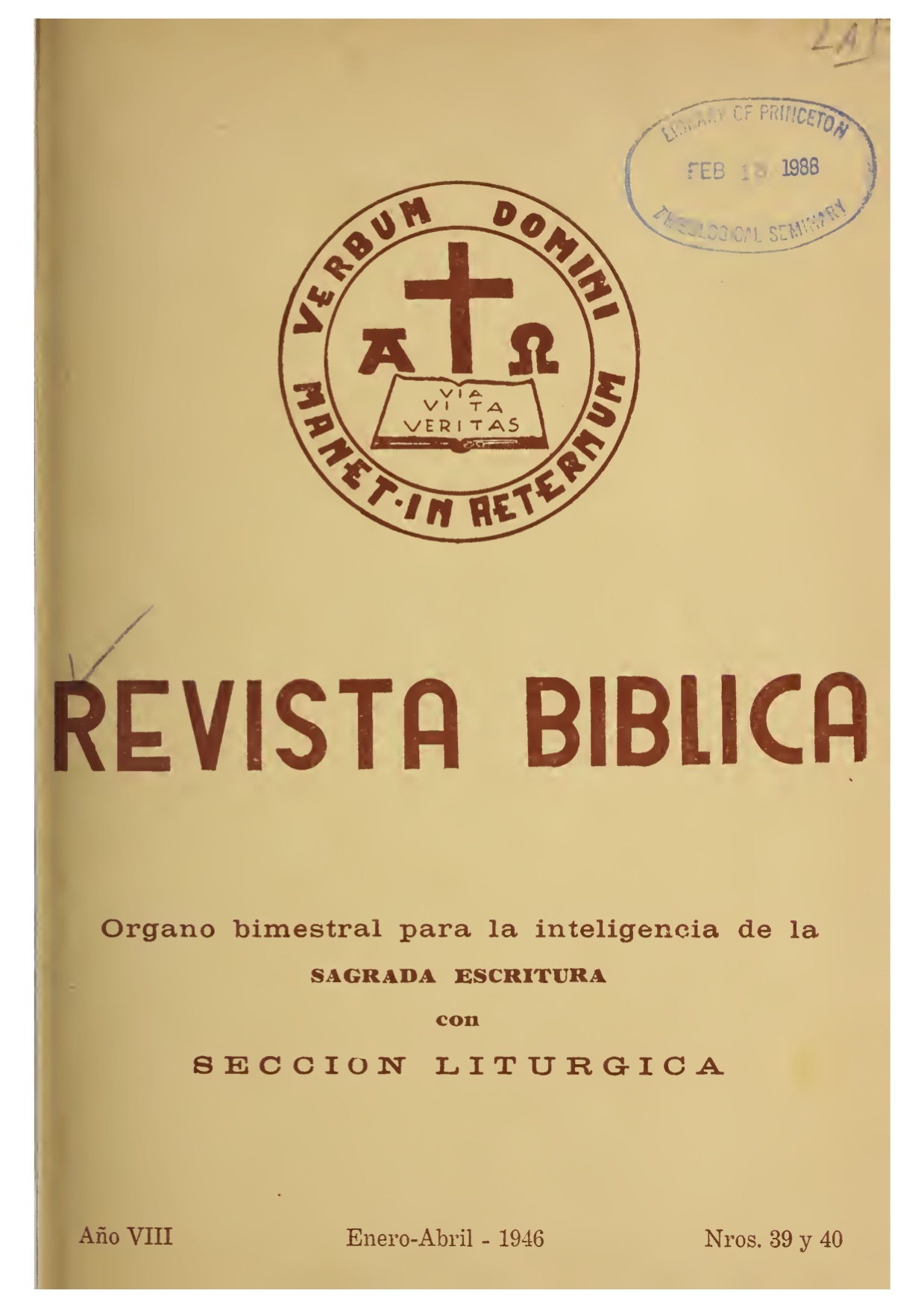 Tapa del año III, 1942.